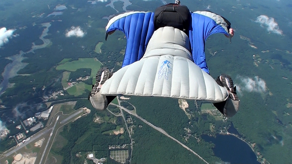 Drafting Another Wingsuiter